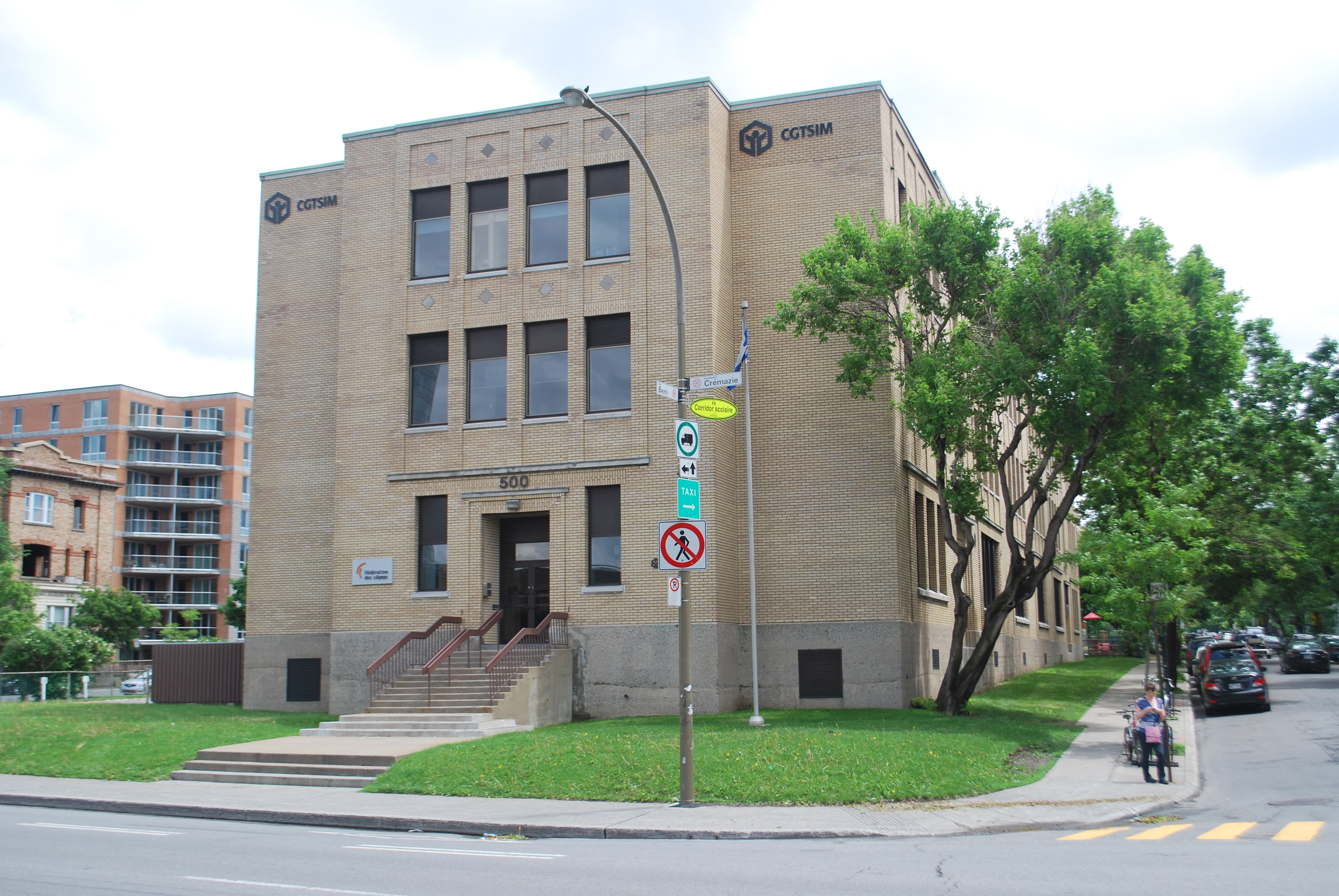 Fédération des cégeps, 500, boulevard Crémazie Est, Montréal.